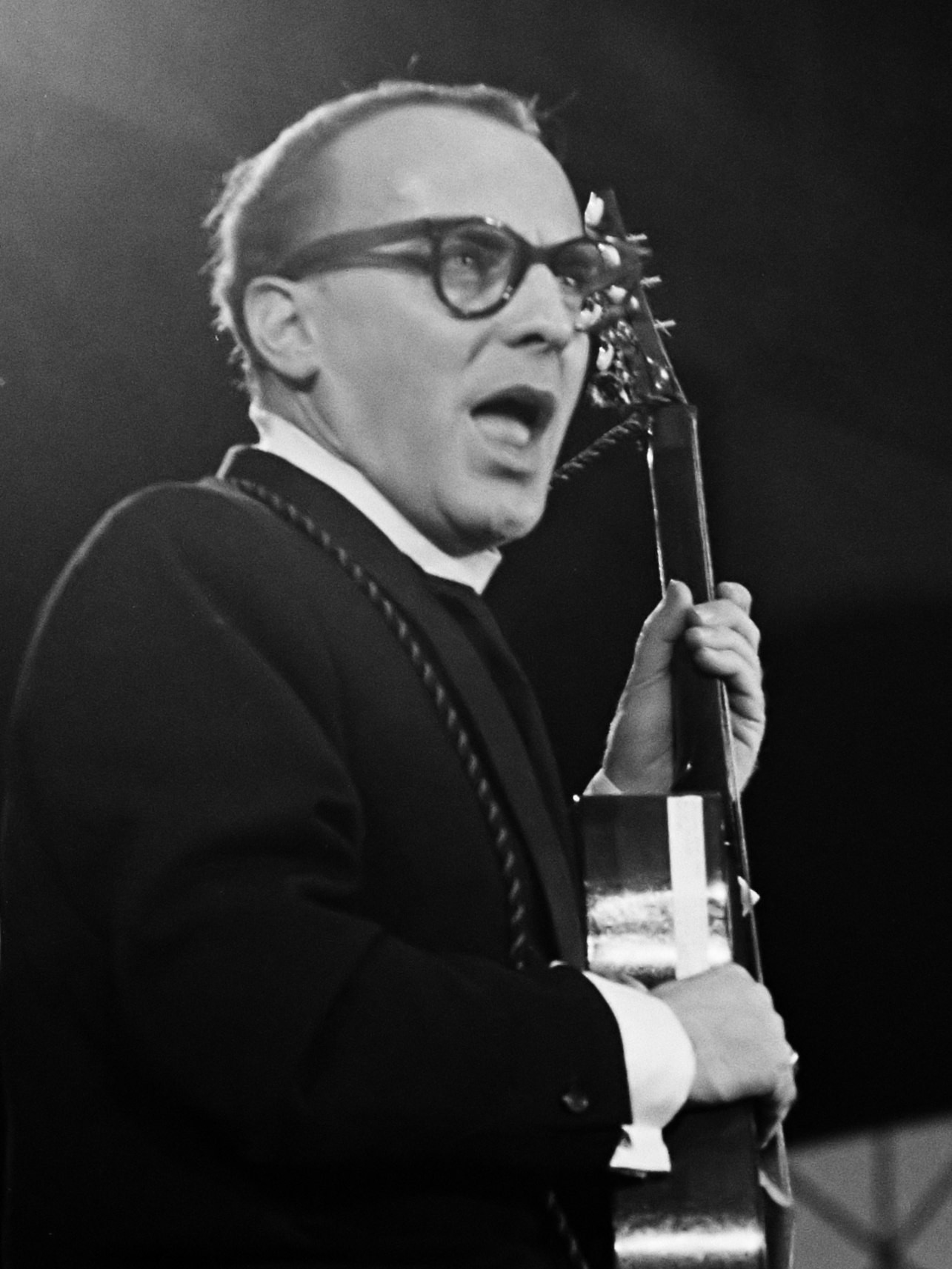 Grand Gala du Disque populaire in Kurhaus te Scheveningen; Wim Sonneveld als de zingende frater Venantius 13 oktober 1963